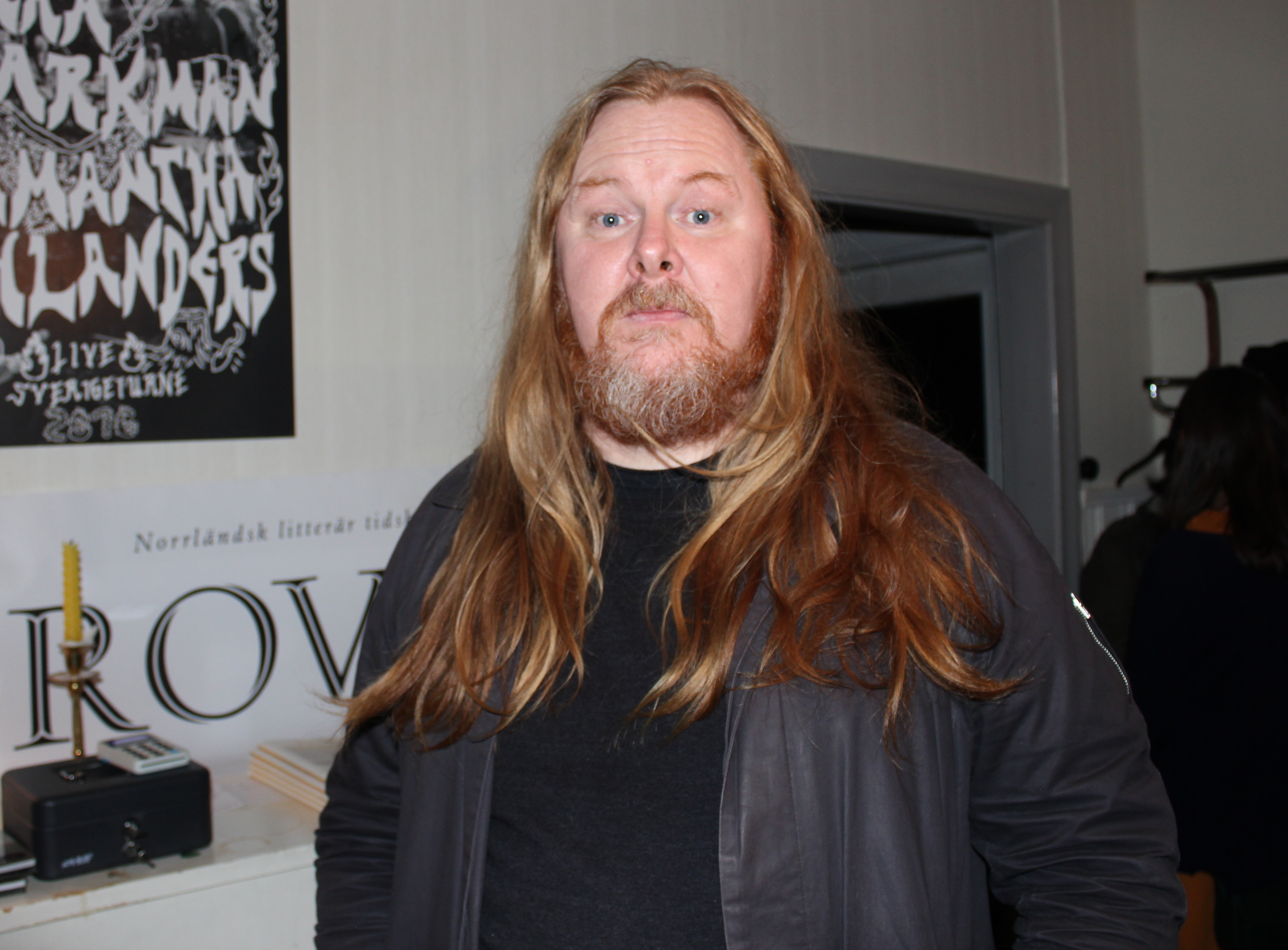 Bild av Mattias "Matti" Alkberg, tagen under poesikväll i KF-Huset, Klöse 2016-10-14. Fotografen frågade Matti om lov och berättade om syftet med bilden, nämligen att lägga upp den på wikipedia, innan fotografiet togs. Fotografen är tacksam för att Mattias ställde upp på att vara med på bild.